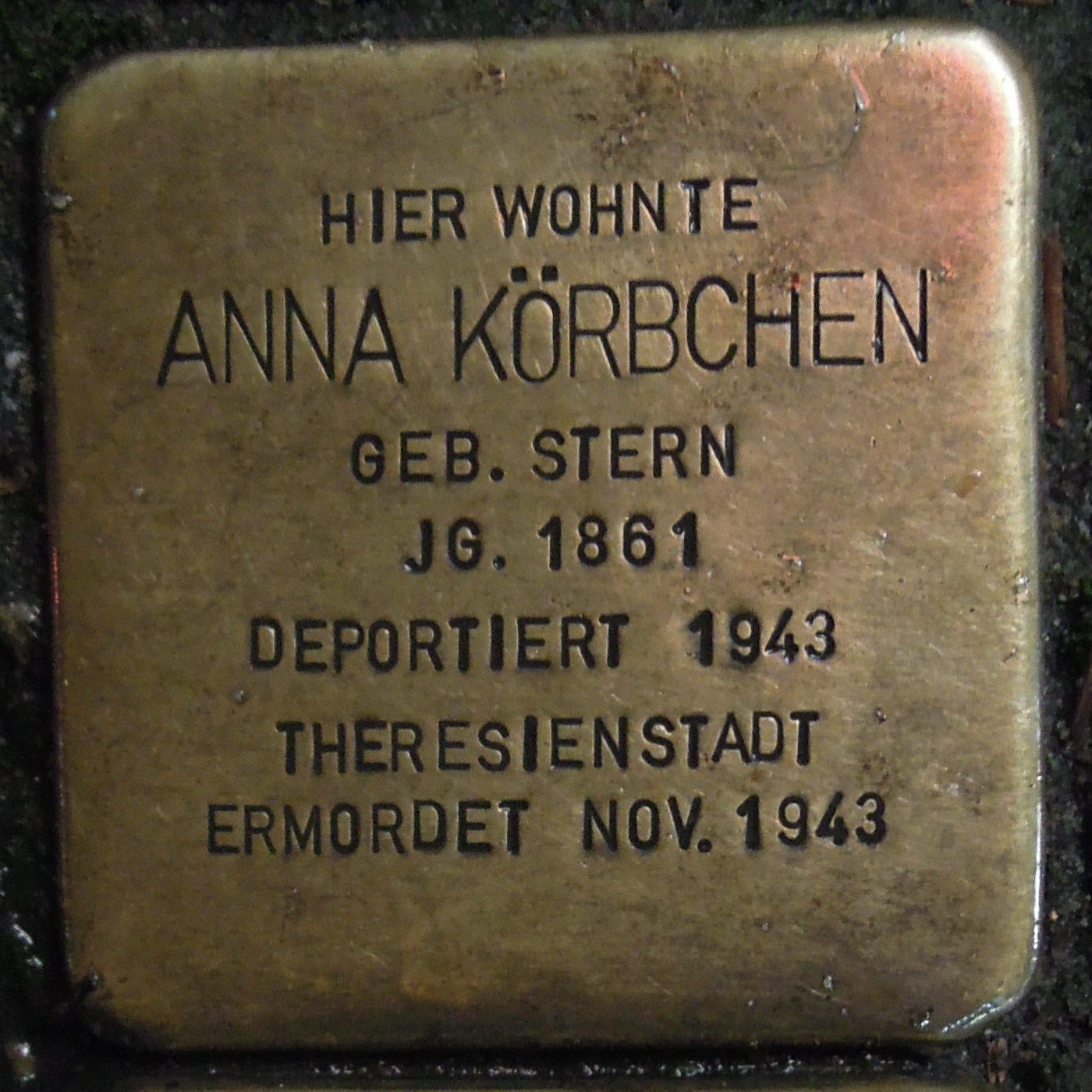 Stolperstein Geldern Bahnhofstraße 9 Anna Körbchen